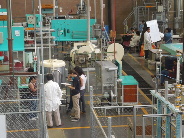 ESIQIE Laboratorio de Operaciones Unitarias